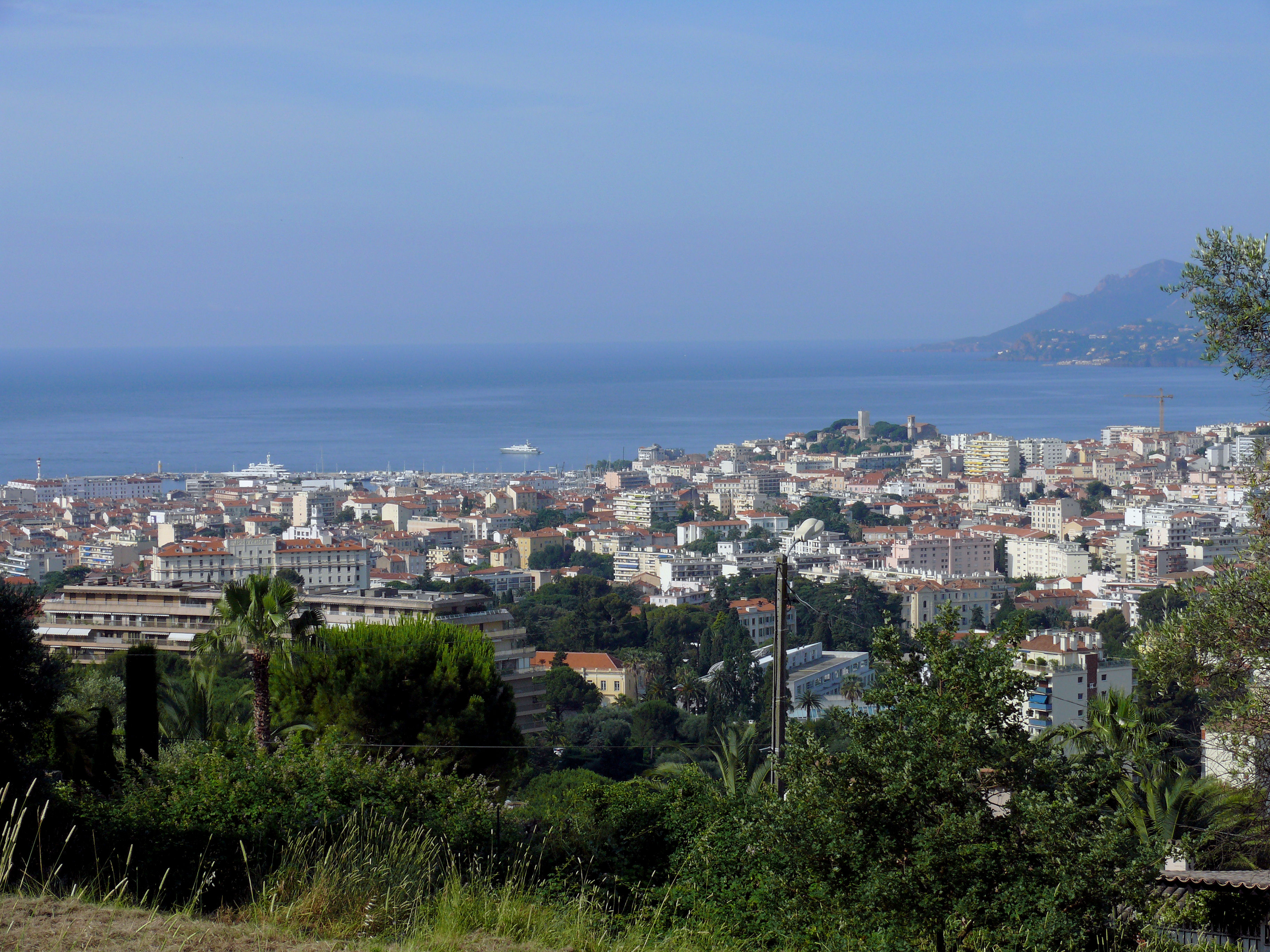 Cannes vue de l'avenue Victoria, au Cannet